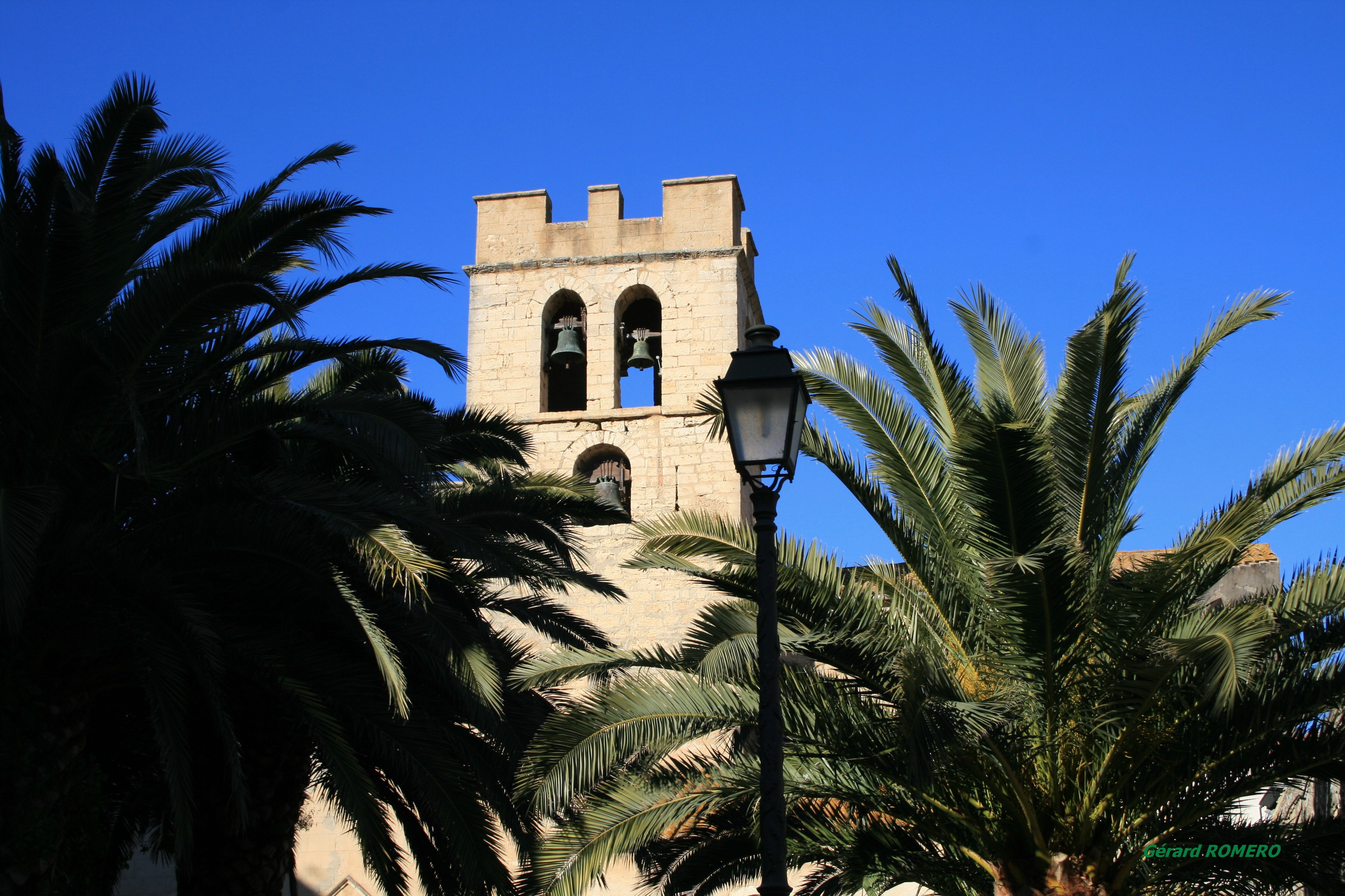 Eglise Saint Jean de La Palme du XIIIe siècle